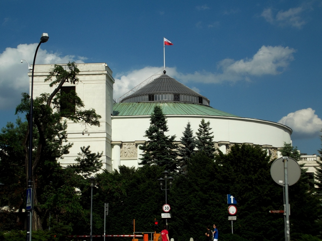 Zdjęcie zrobione podczas 17. posiedzenia Sejmu RP VII Kadencji